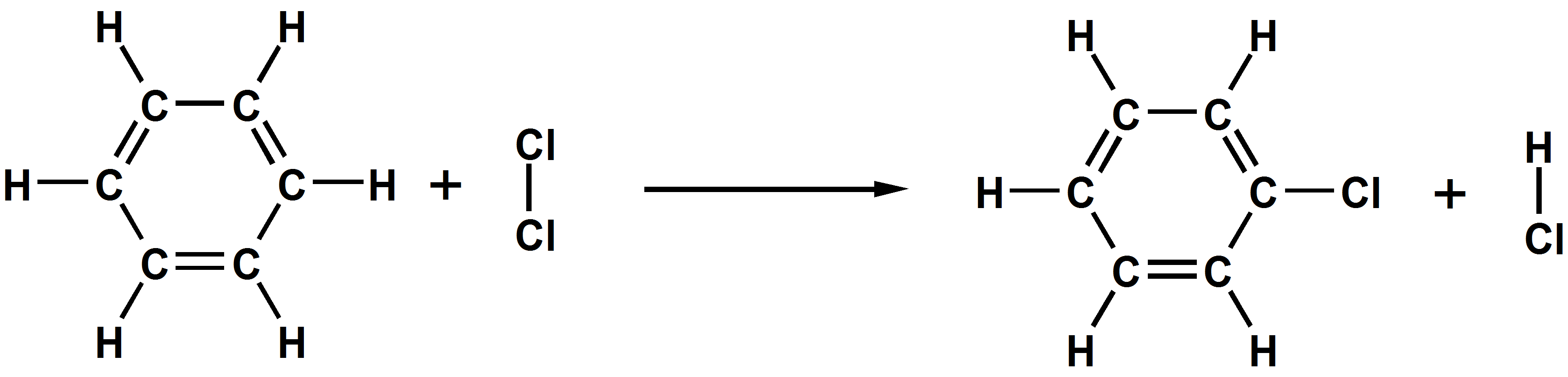 Benzenel Cl substitution lb 2d